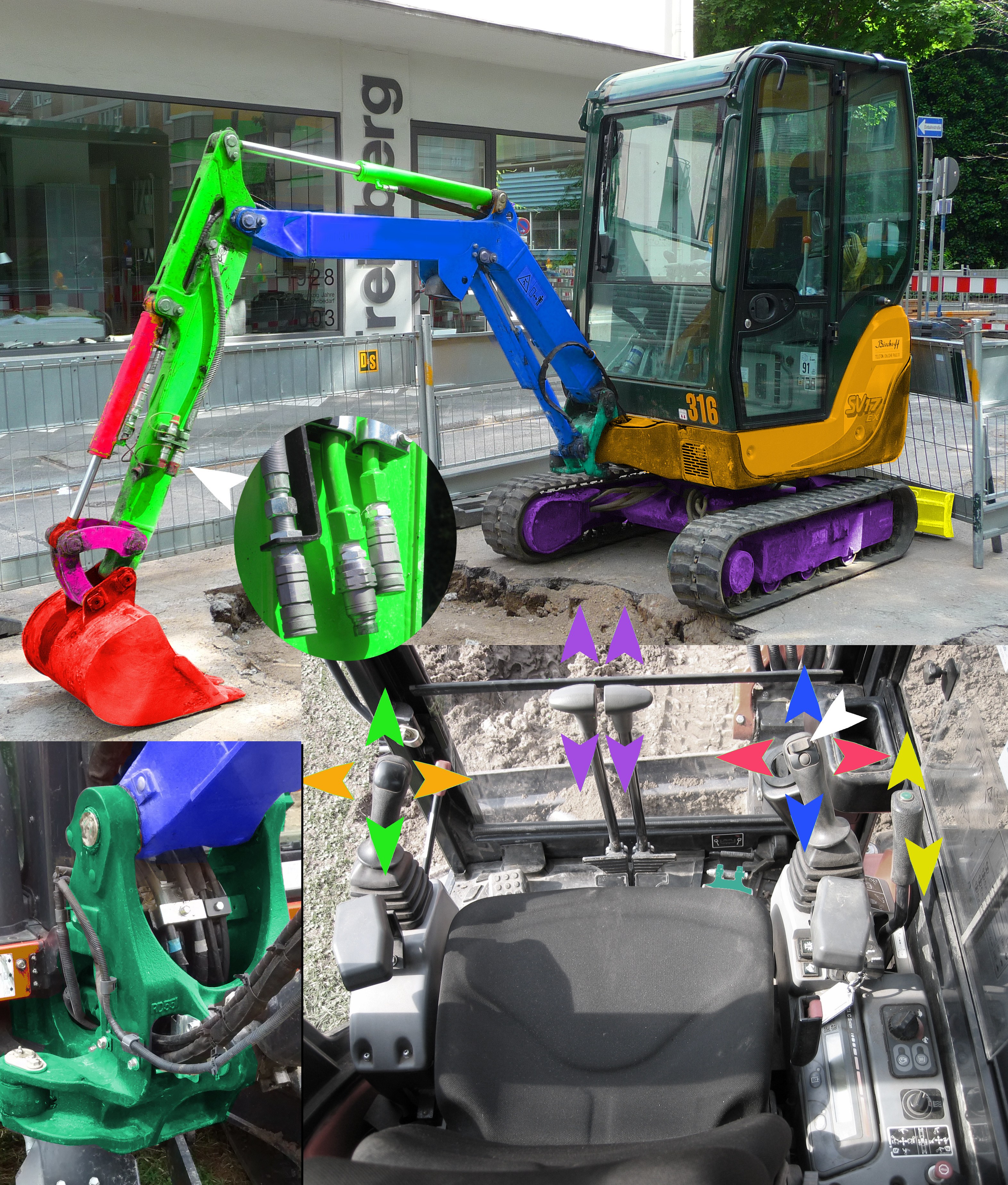 Minibagger Beschreibung